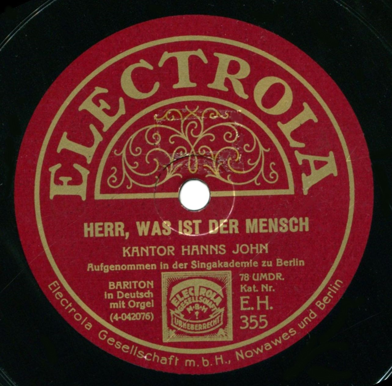 Label einer Schallplatte von Kantor Hanns John